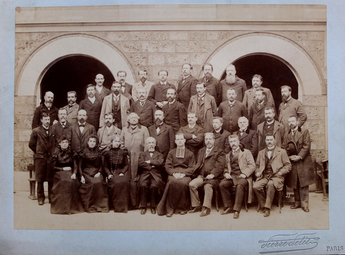 Photo du corps professoral au lycée Montaigne (Paris). Daté au verso 1897-1898. Sur carton du photographe Pierre Petit. Dimensions du cliché : 25,3 x 18,3 cm. Papier albuminé, collection privée.